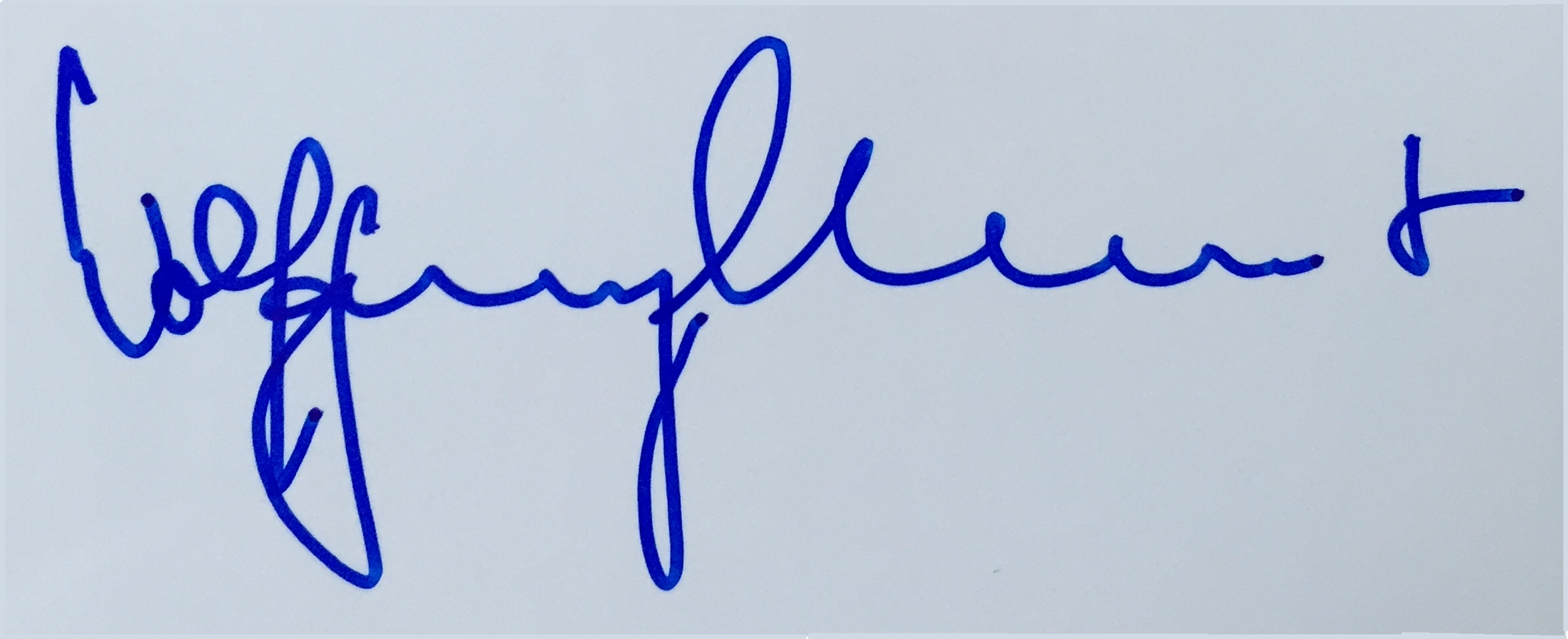 Original Autogramm Wolfgang Clement